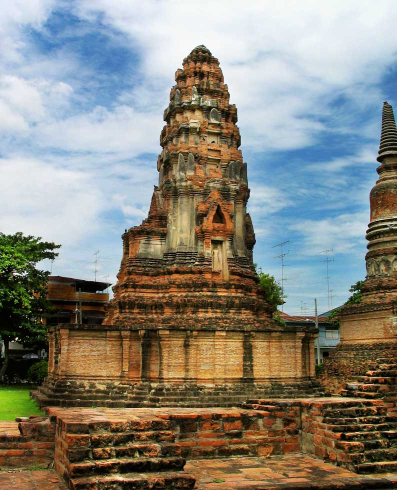 Wat Phra Sri Rattana Mahathat, Lopburi, Thailand